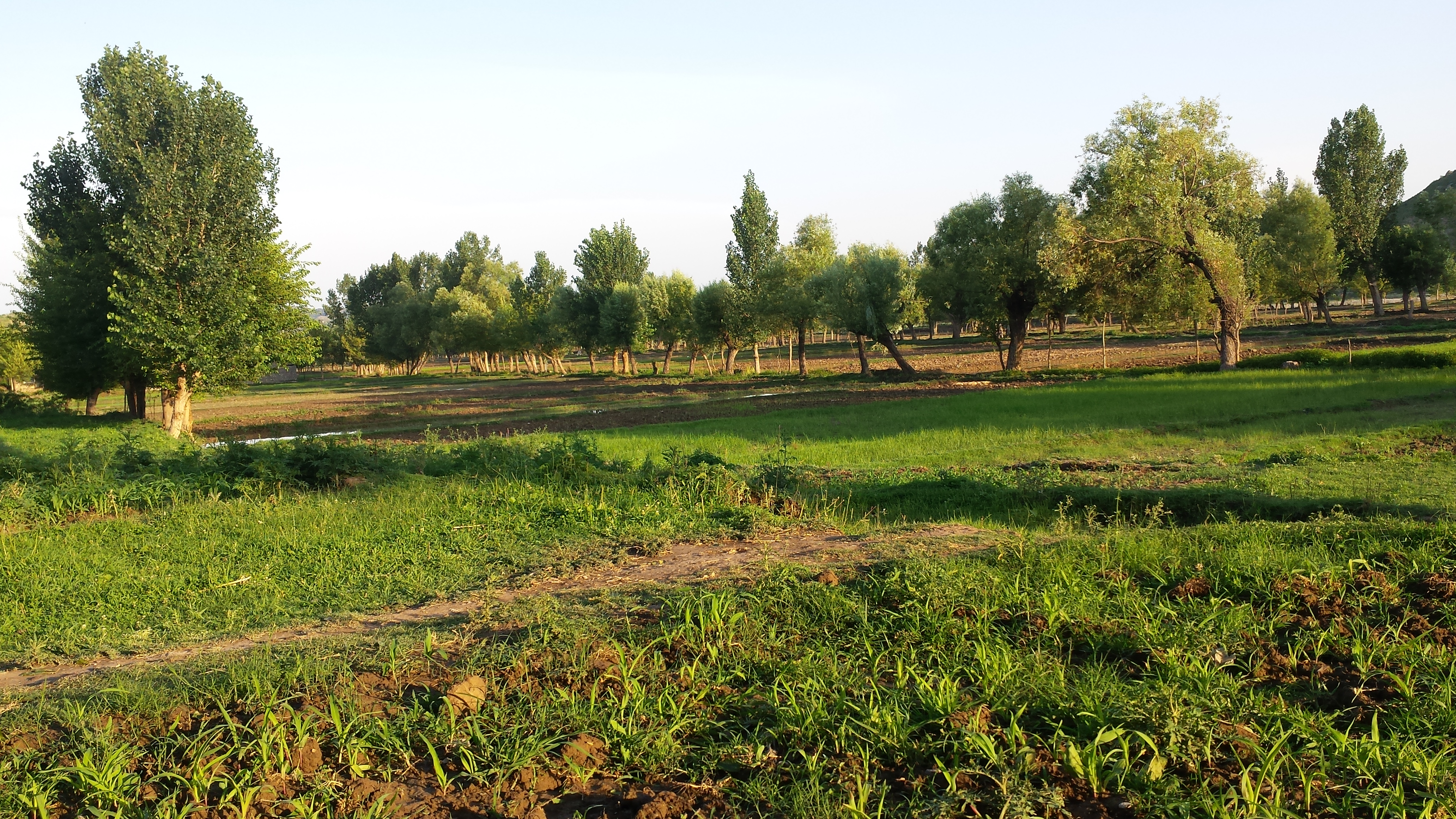 BAGAN KURRAM AGENCY BY UMAR MUNIR